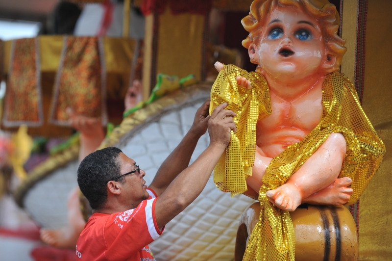 ARC Acadêmicos da Asa Norte, preparativos para o Carnaval 2012.